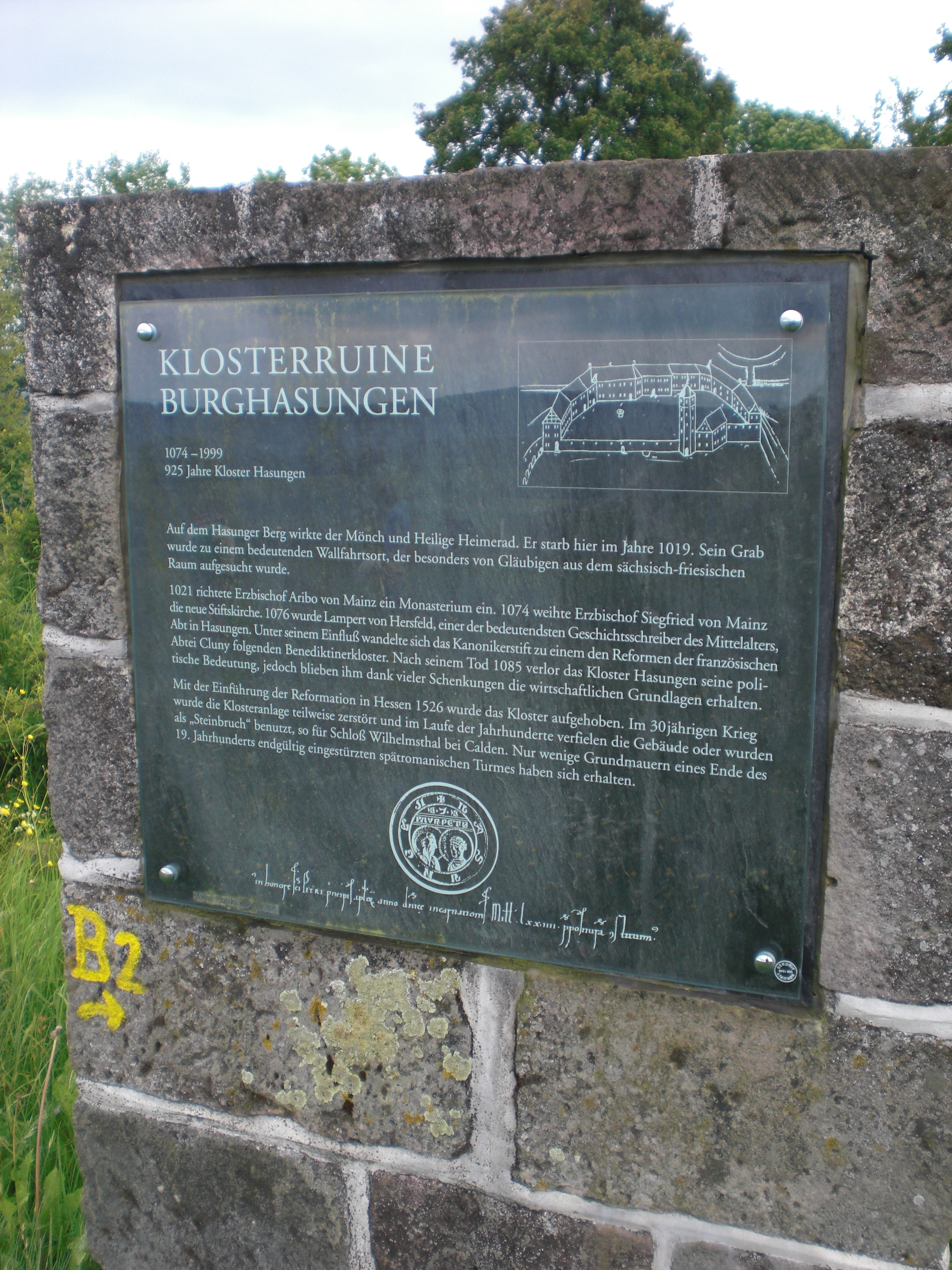 Informationstafel an der Ruien des Klosters Hasungen bei Kassel